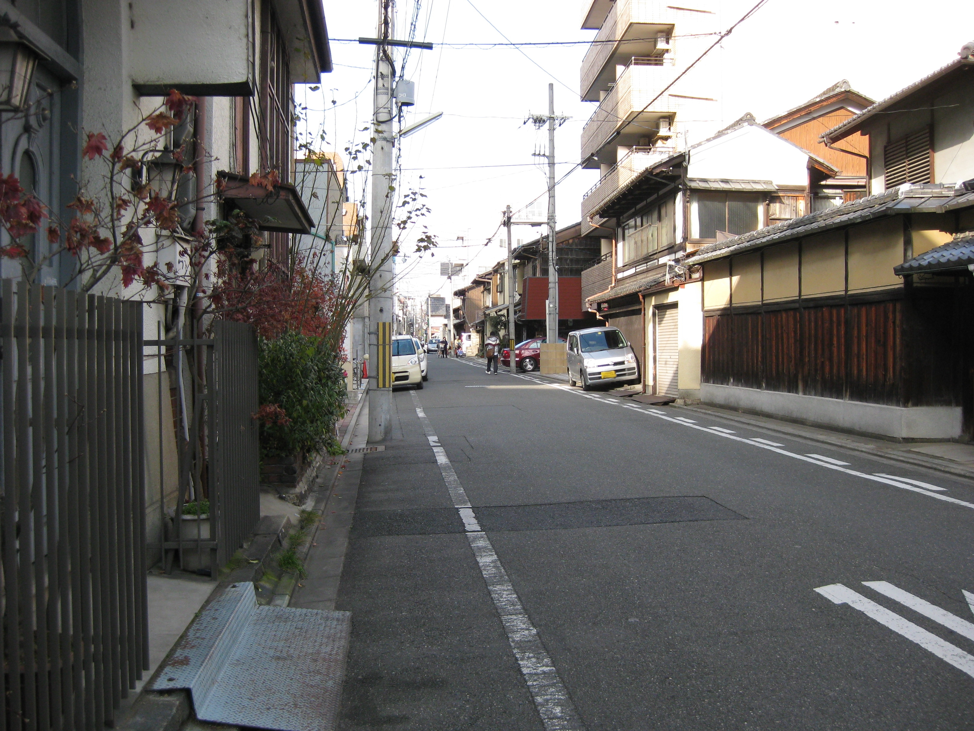 間之町通。北方向に撮影（押小路通付近）